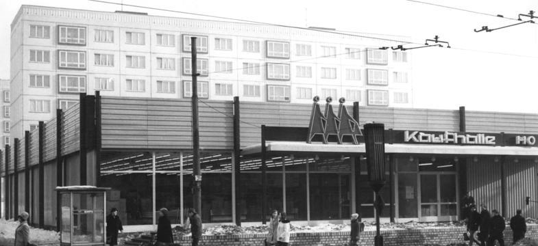 Leipzig, Kaufhalle Zentralbild Gahlbeck 21-1-1970 Leipzig: "Mach-mit"-Wettbewerb koodiniert Bürgerfleiß und Anstrengungen der Bauschaffenden-Zu den sichtbaren Ergebnissen und Anstrengungen von Bürgern in den Wohngebieten und den Leistungen der Bauschaffenden des Stadtbezirkes Leipzig-Süd im "Mach-mit"-Wettbewerb 1969 gehört diese moderne Kaufhalle. Durch die tatkräftige Unterstützung vieler Einwohner dieses Stadtbezirkes entstanden im Vorjahr u. a. eine Volksschwimmhalle, zwei Kaufhallen und 20 Kinderspielplätze.